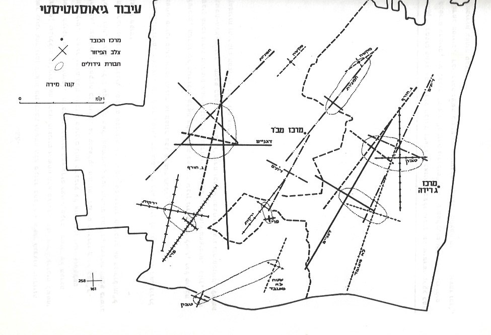 איור מתוך עבודת תזה בגאוגרפיה 1970